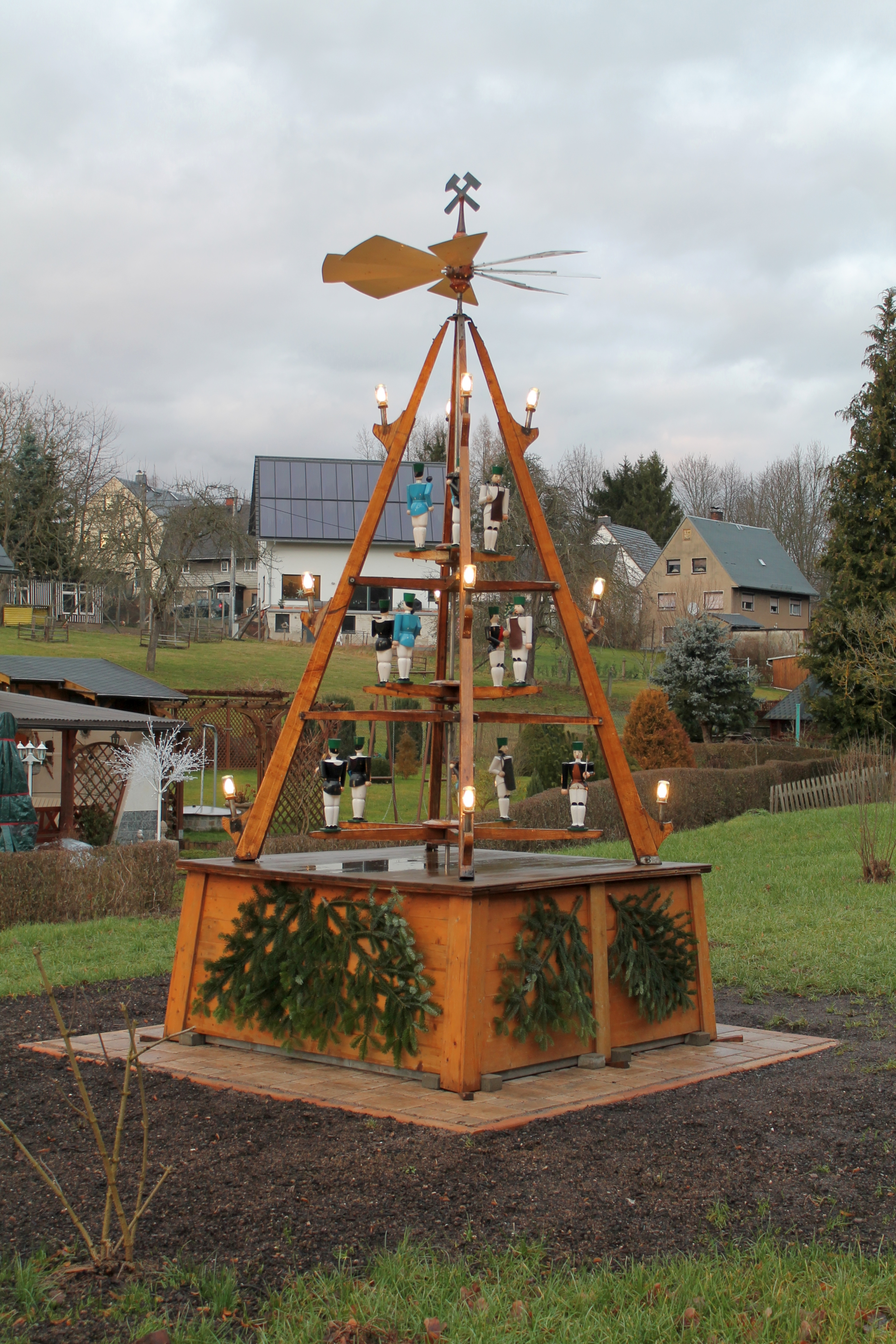 Ortspyramide Kuhschnappel (St. Egidien). Sachsen, Deutschland.